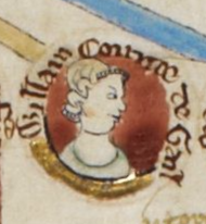 William of Talou